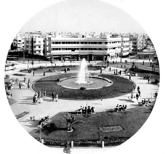 Dizengoff Square 1939